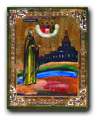 Прп. Варнава Ветлужский. Икона. XIX в. (Частное собрание. Н. Новгород)